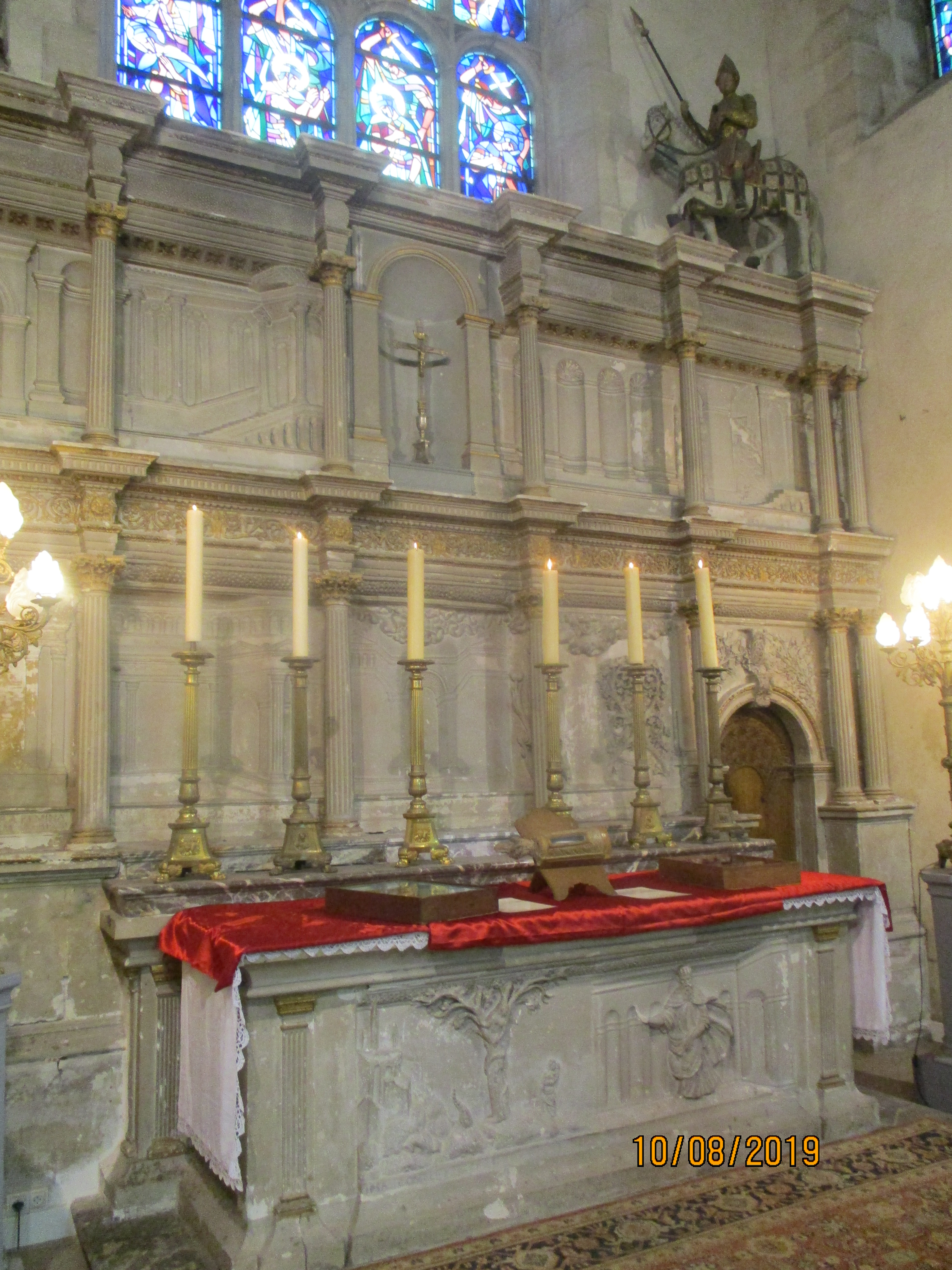 Autel et retable de l'église Saint-Maurice de Sens.